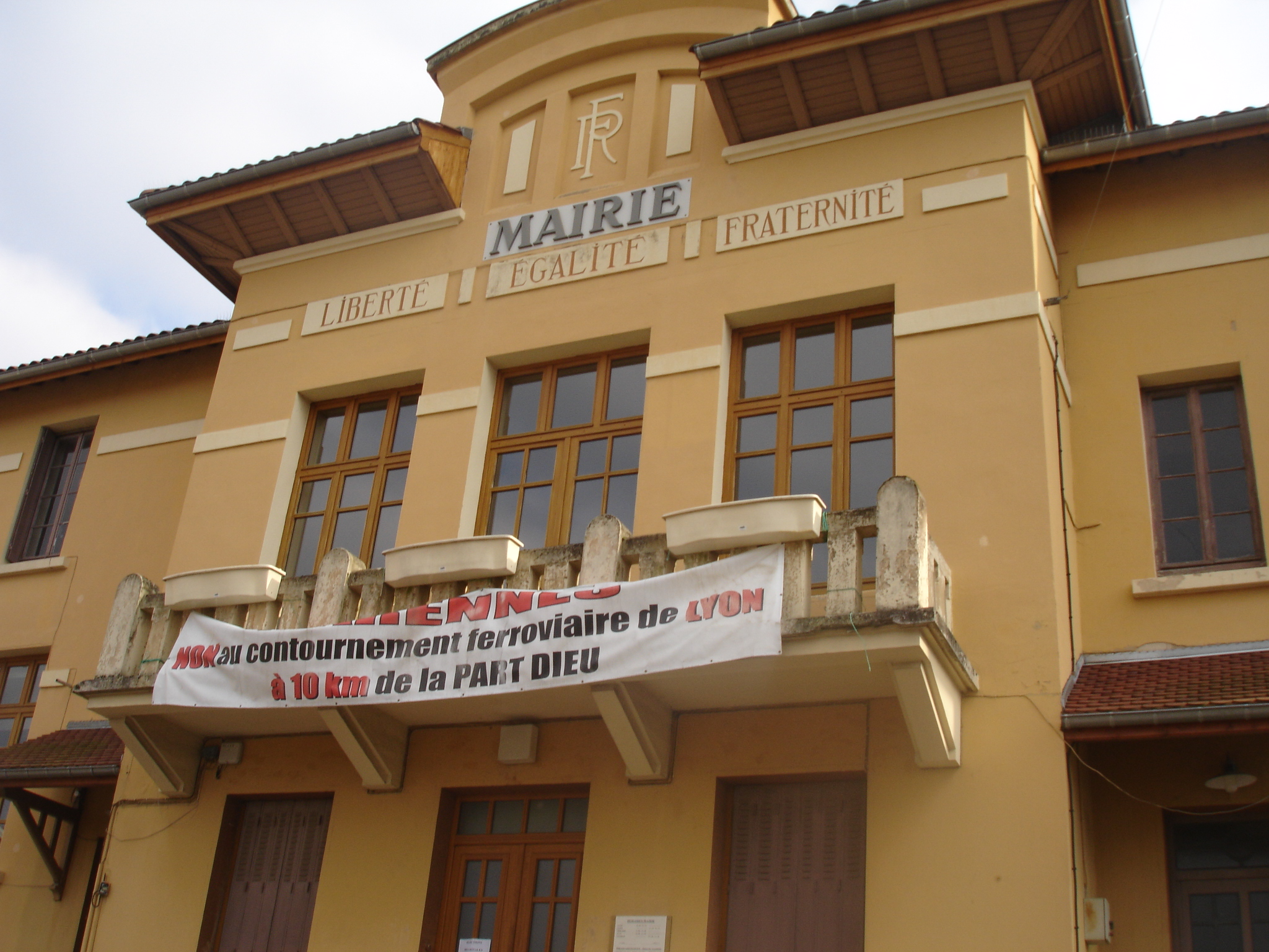 Marennes (69) : la mairie